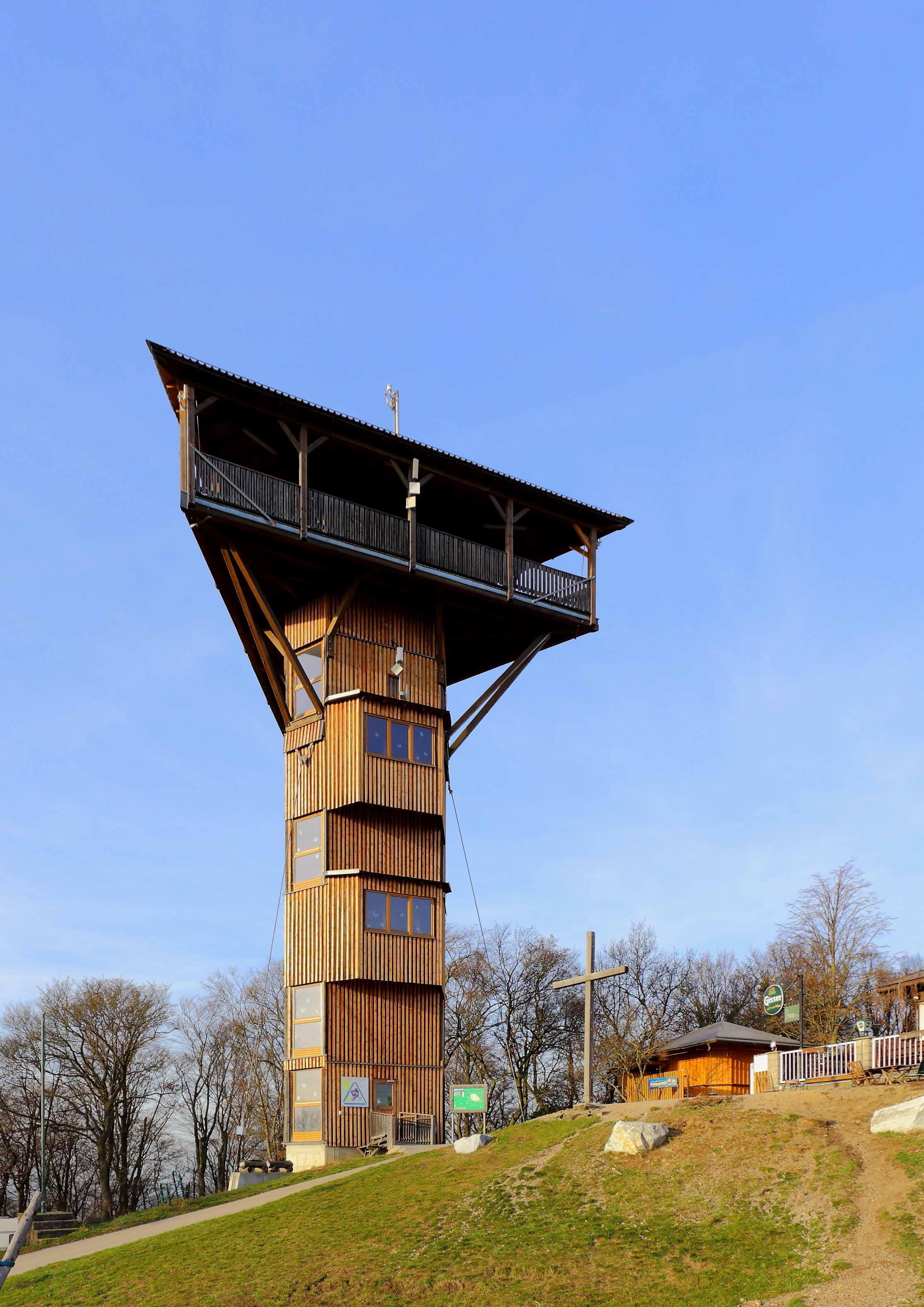 Die 2004 errichtete Buchbergwarte auf dem 469 Meter hohen Buchberg an der Gemeindegrenze zwischen Maria Anzbach und Neulengbach in Niederösterreich.